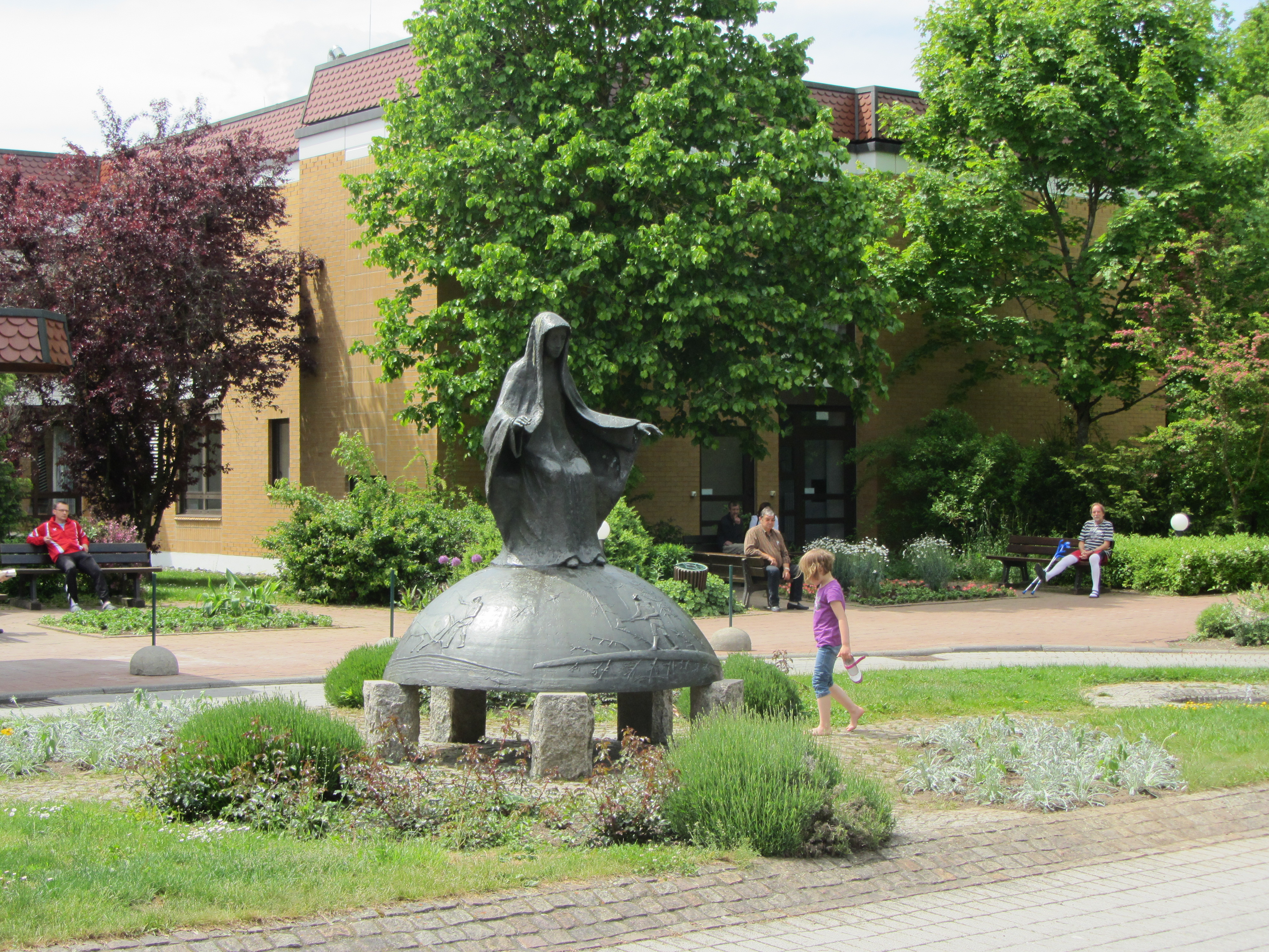 Kliniken Landkreis Biberach - Brunnen vor dem Haupteingang